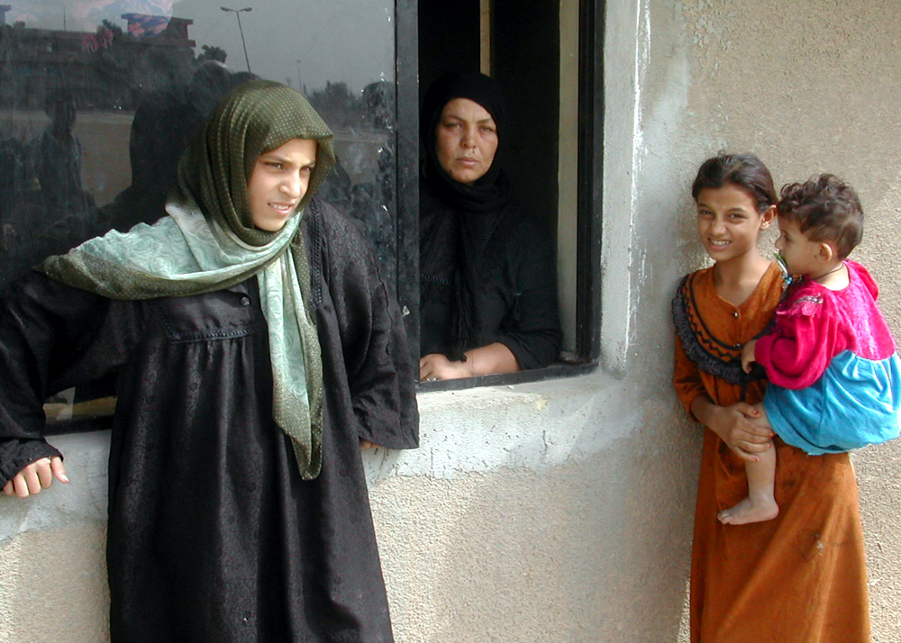 Iraqi Refugees, Damascus, Syria